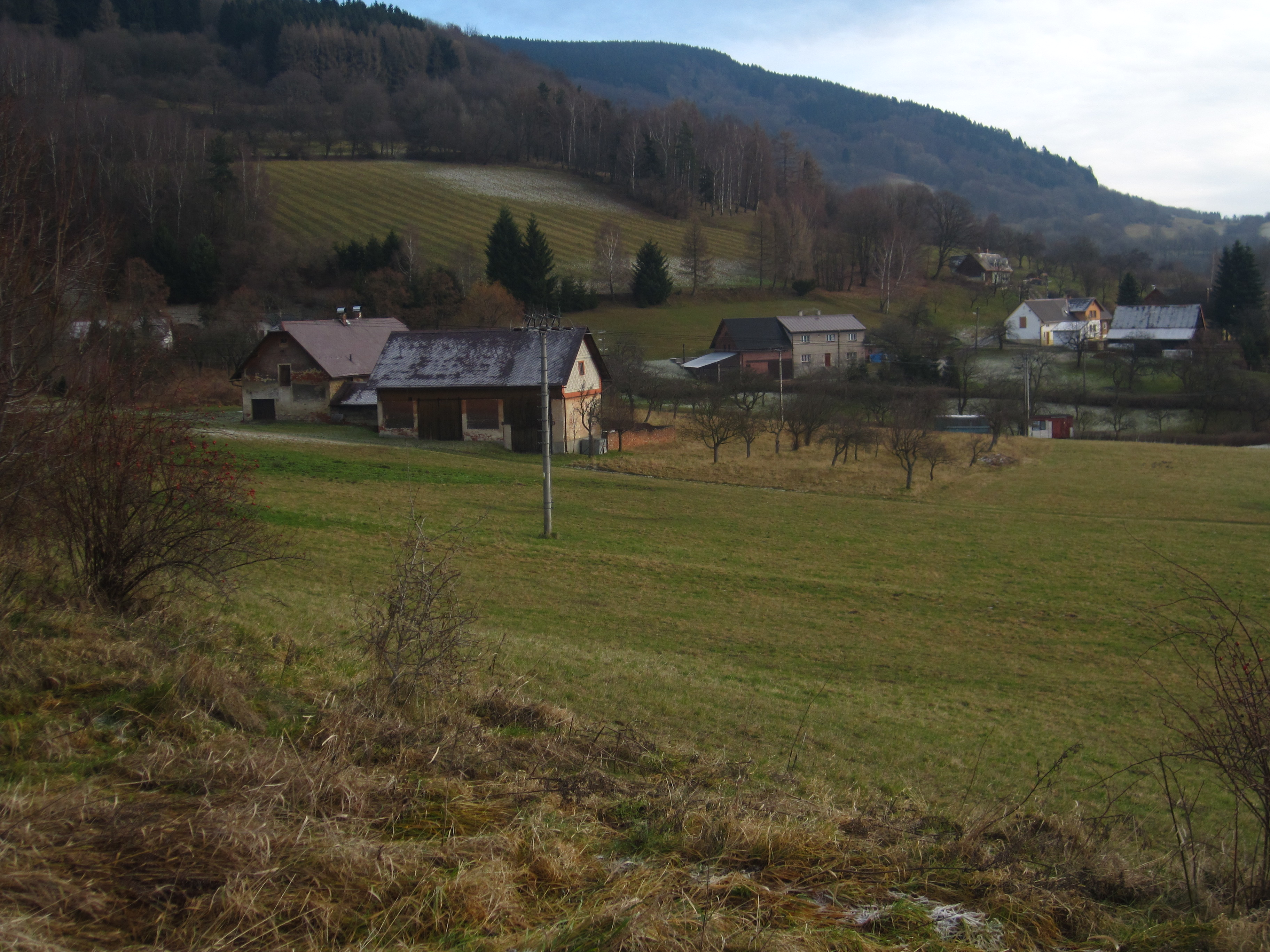 Jiříčkov - pohled na ves od silnice Světlá-Vesec